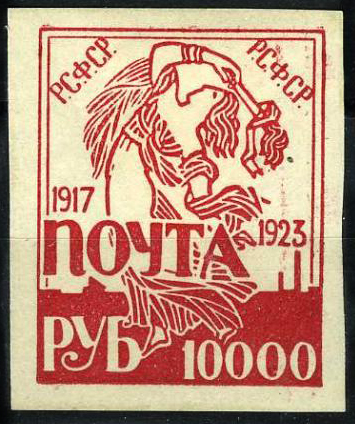 Фантастическо-спекулятивный выпуск марок от имени РСФСР, 1923 год